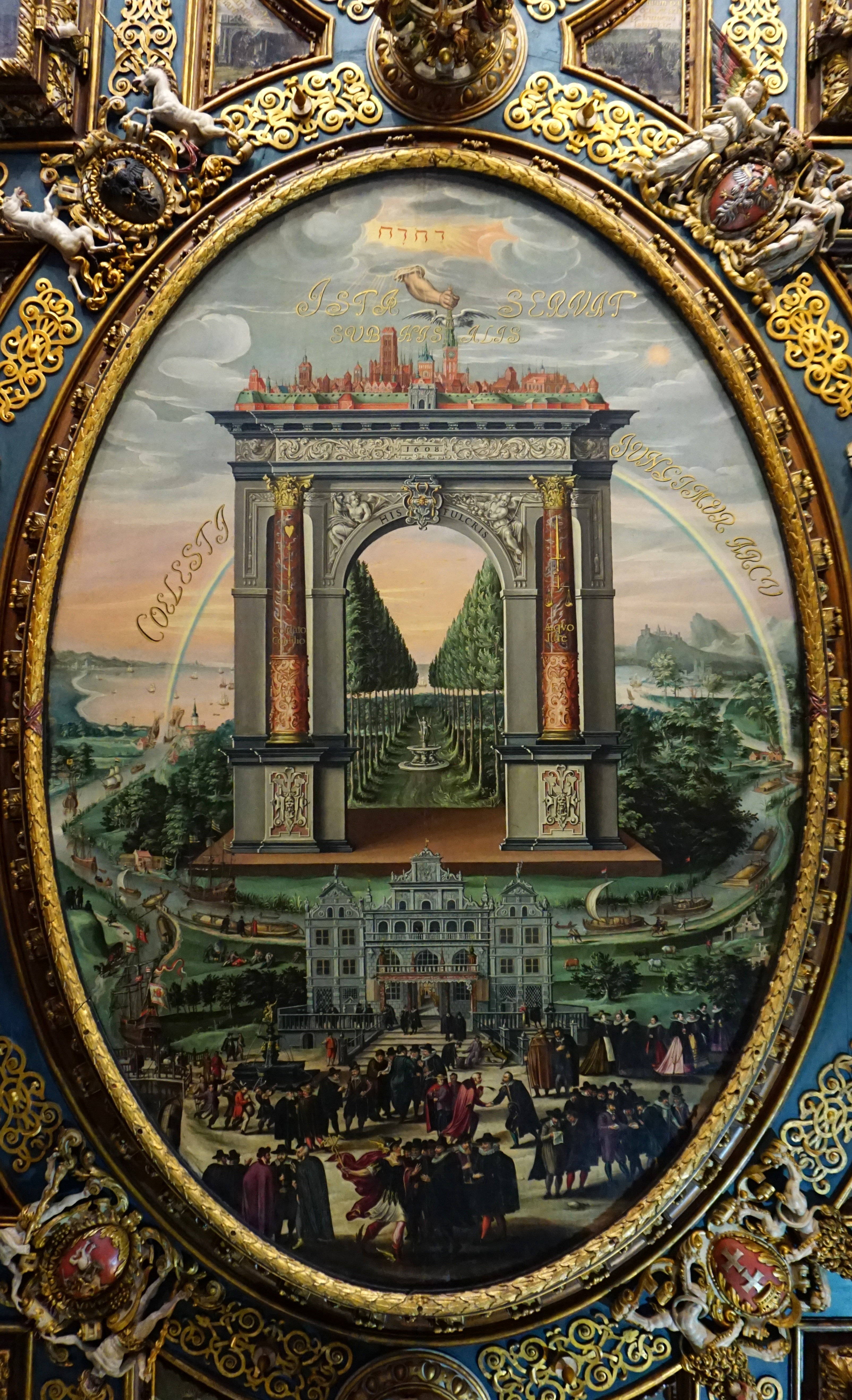 Gdansk 2018 spring -028